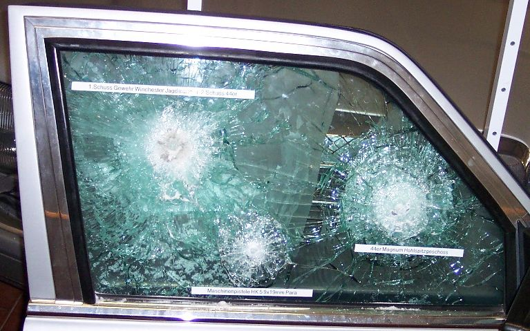 Panzerglas mit Beschussprobe in der Motortechnica Bad Oeynhausen